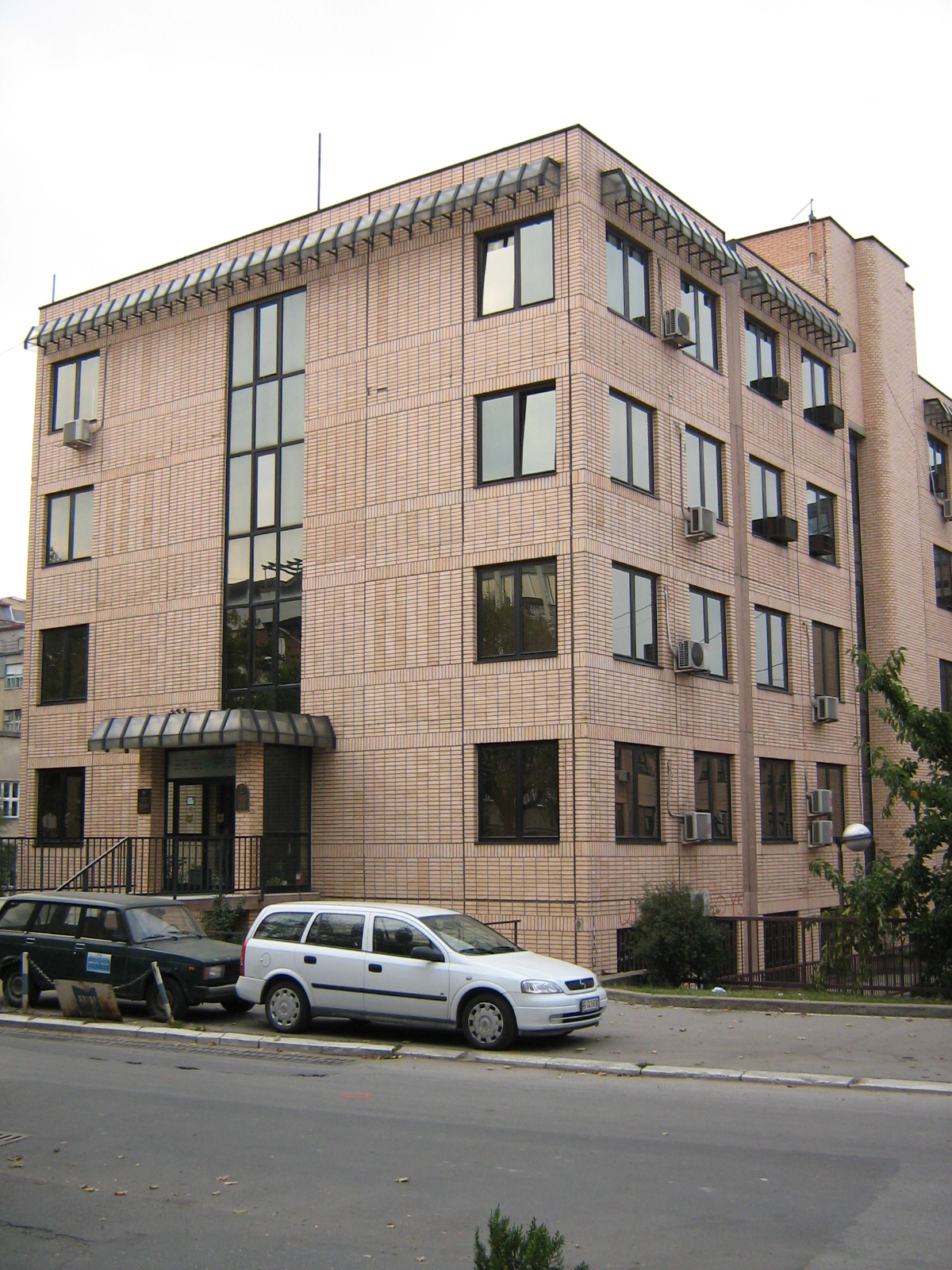 Зграда Института Никола Тесла у улици Косте Главинића 8, на Сењаку. Моја слика. Дао је у јавно власништво. Licensing